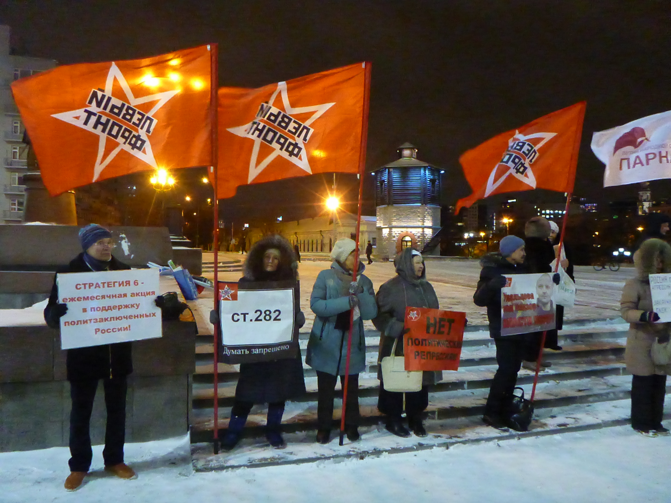 Левый фронт на пикете в Екатеринбурге 6 декабря 2019 года